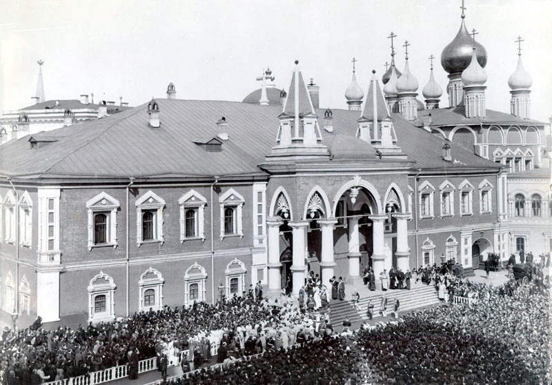 Выход Коронационной процессии из келий Чудова монастыря